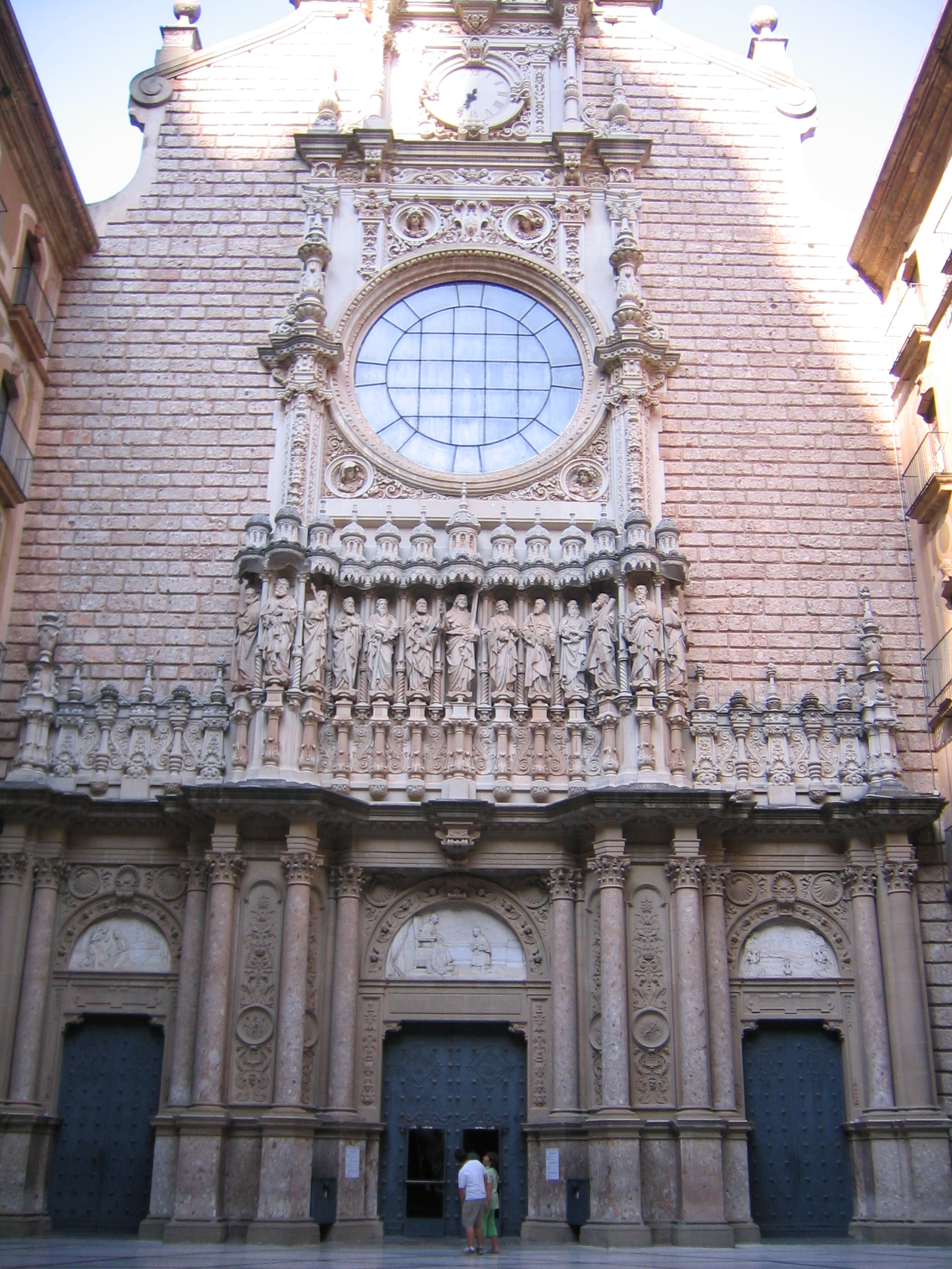 Monasterio de Montserrat. Portada de la basílica. Barcelona.